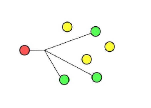 Es un sencillo diagrama